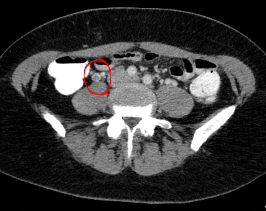 Umspülter Thrombus in der rechten Ovarialvene in der Computertomographie.